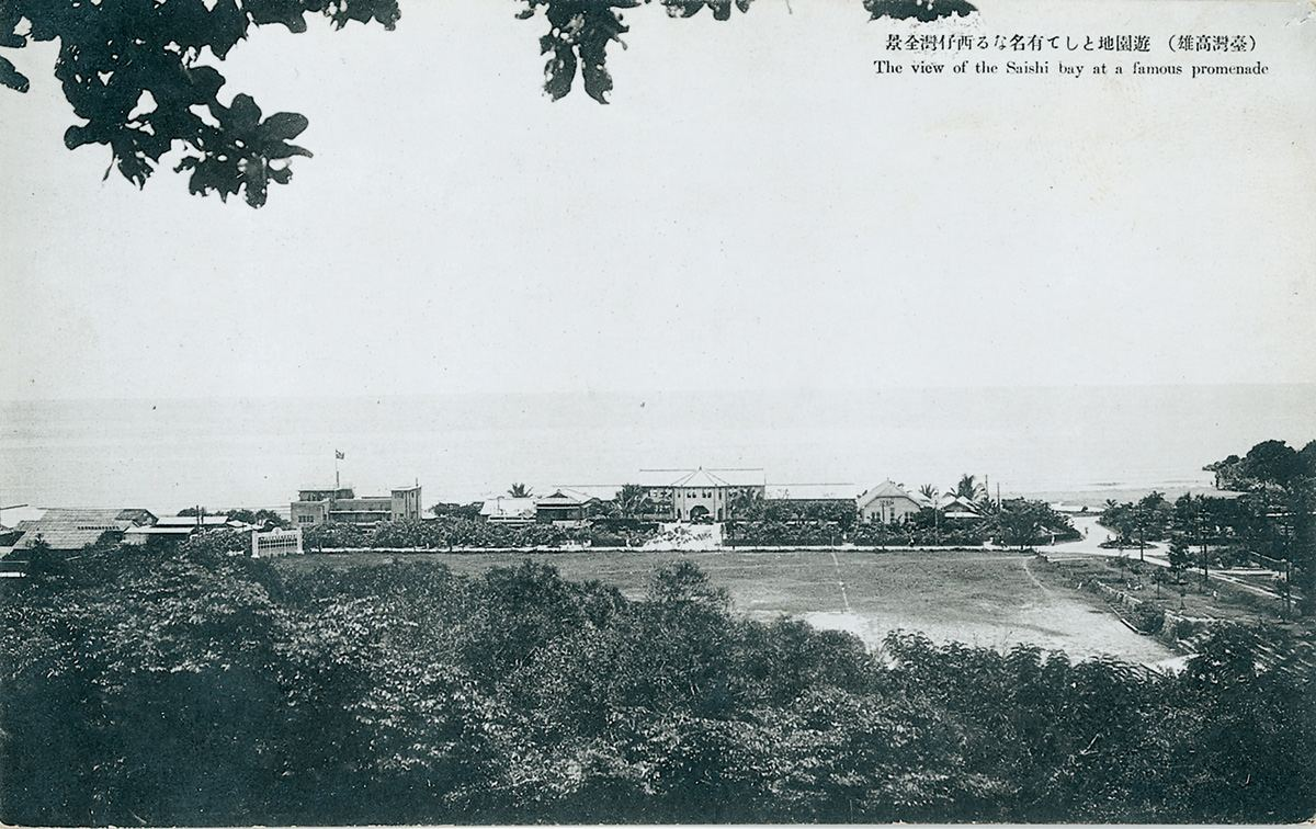 中文（台灣）: 西子灣全景